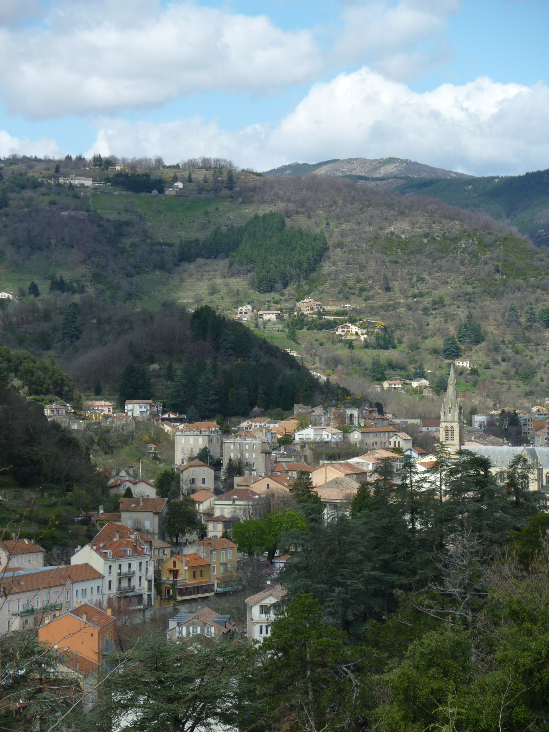 Vue générale Vals, depuis le dessus de l'hôpital, Ardèche, 07, France